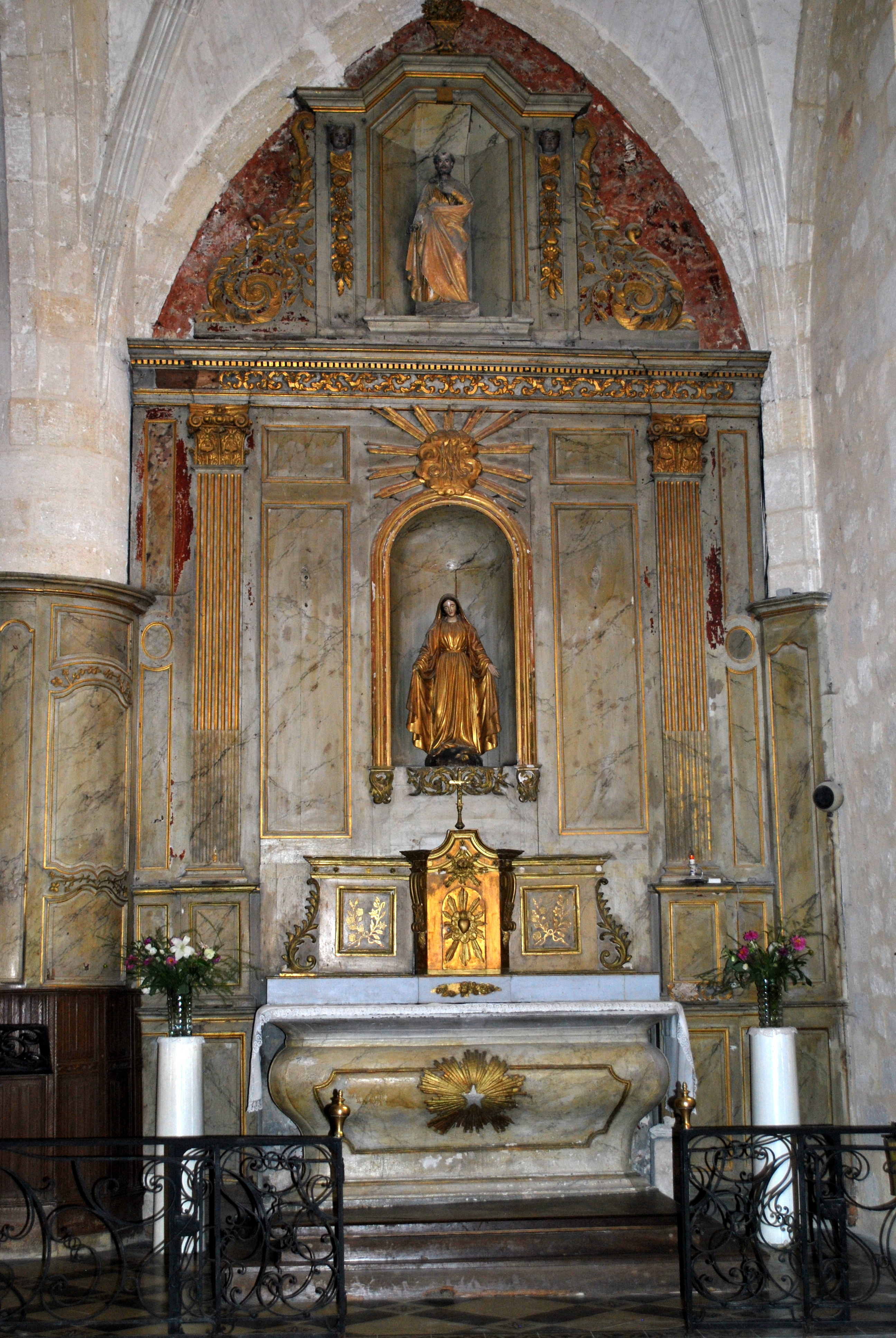 Fronsac église Saint-Martin Chapiteau choeur 1